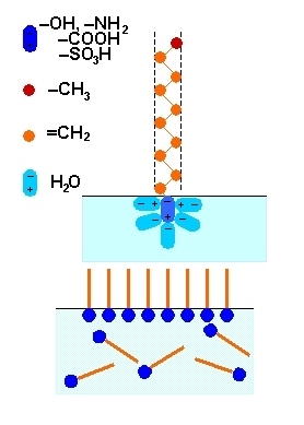 Tenzidmolekula elhelyezkedése vízben, vázlatosan